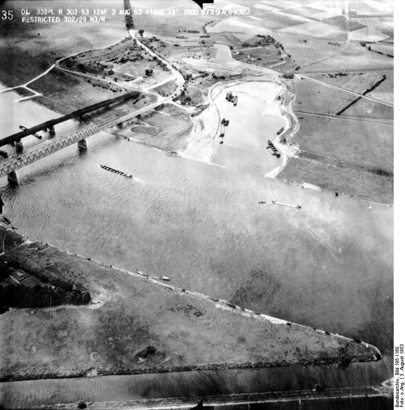 Rheinbefliegung der Alliierten 1953